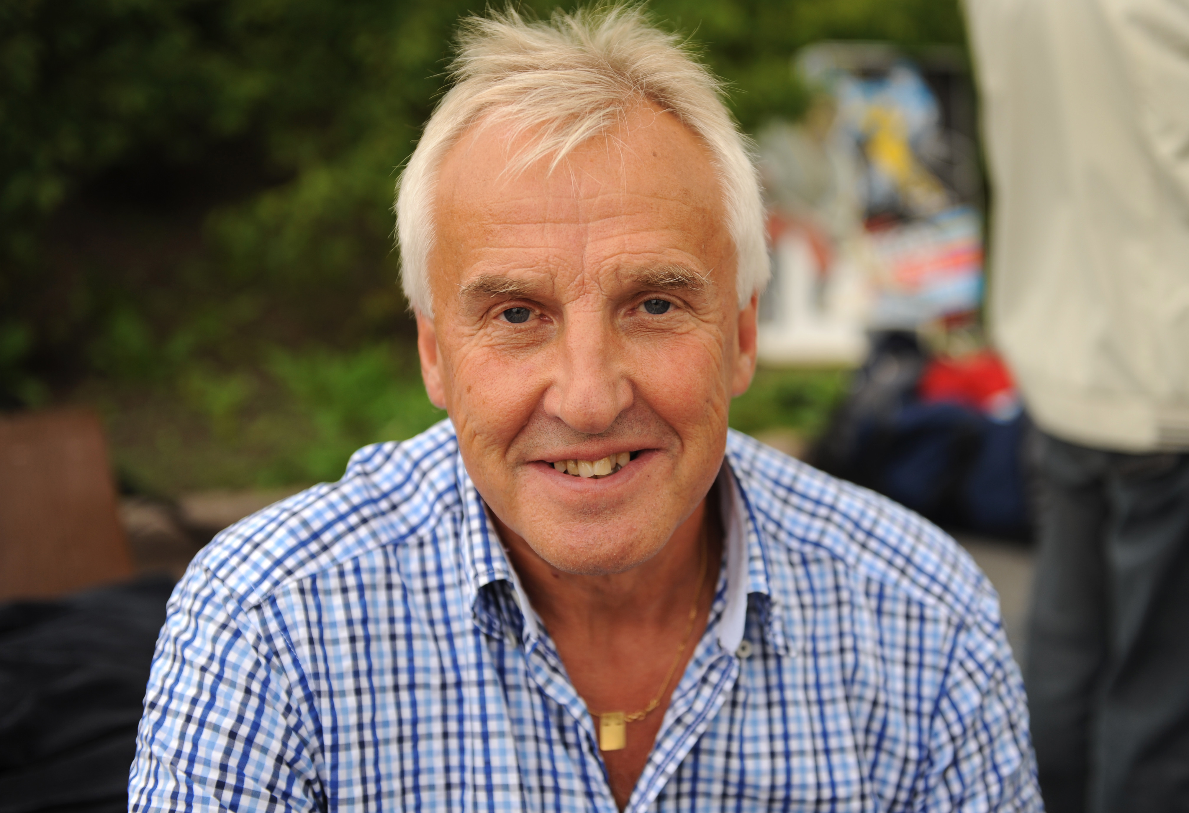 Curt "Curre" Lundmark var förbundskapten när Tre Kronor tog sitt klassiska OS-guld i Lillehammer 1994. Han hade före OS-guldet varit assisterande till Conny Evensson när Tre Kronor tog VM-guld 1991 i Åbo och 1992 i Prag.